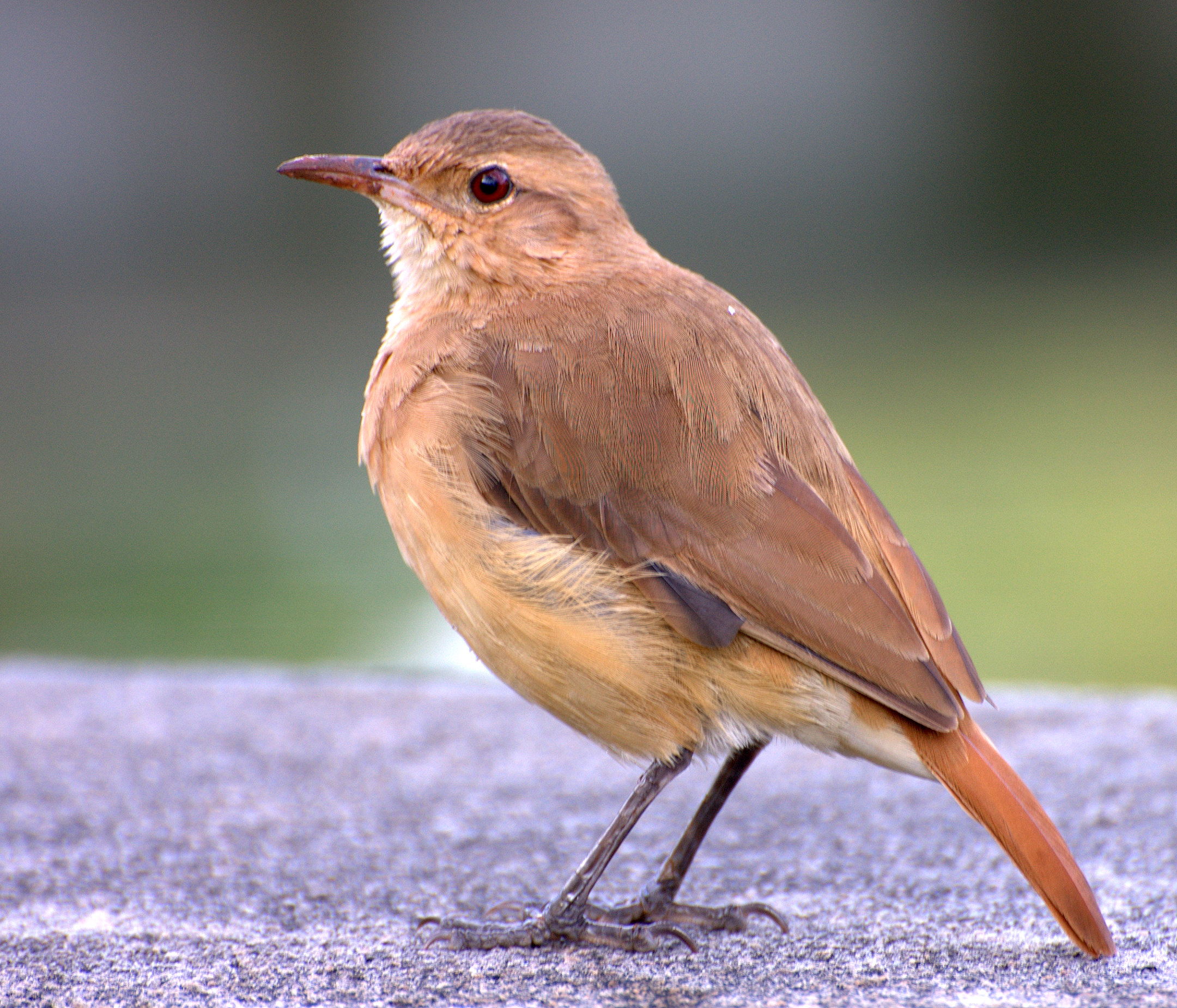 Parque da Independência, Museu do Ipiranga, São Paulo